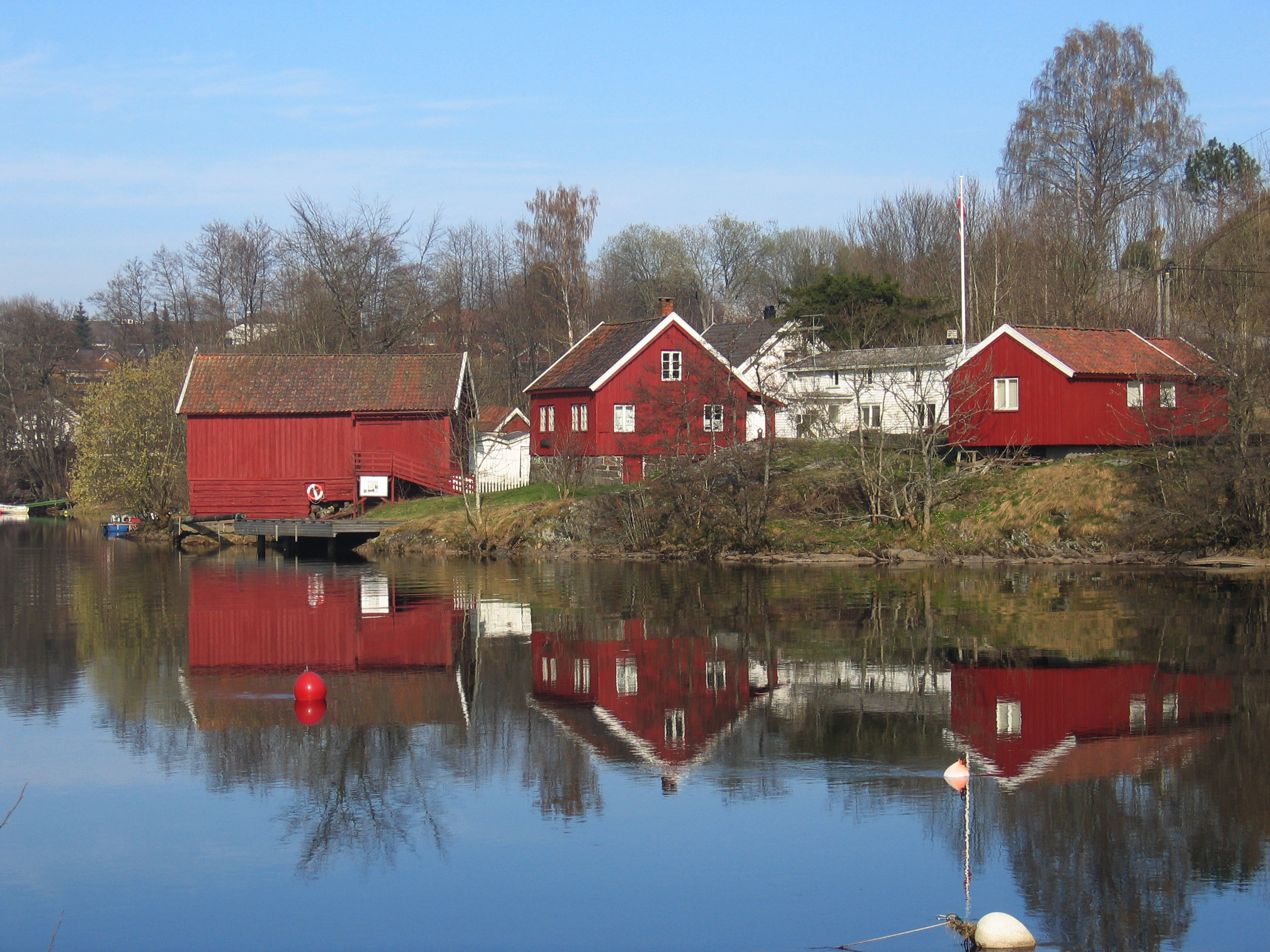 Bomsholmen fløtningsmuseum ved Nidelva i Arendal.